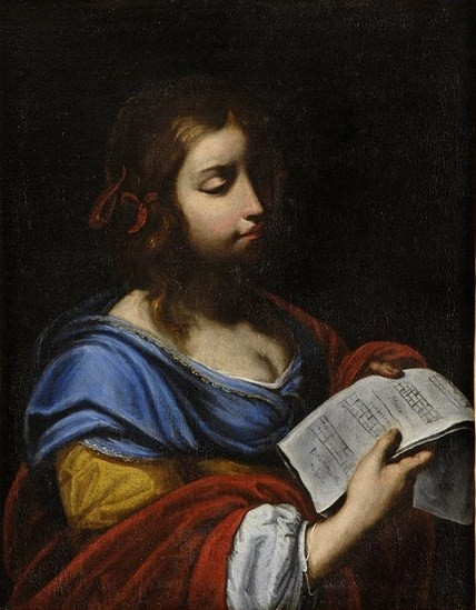 Santa Cecilia bis 1750 Palazzo Orsini, Neapel